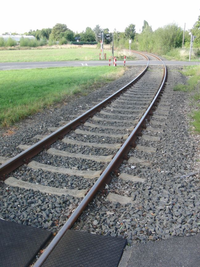 Bahnstrecke von Distelrath nach Düren in Richtung der Anschlussstelle Brückenstraße